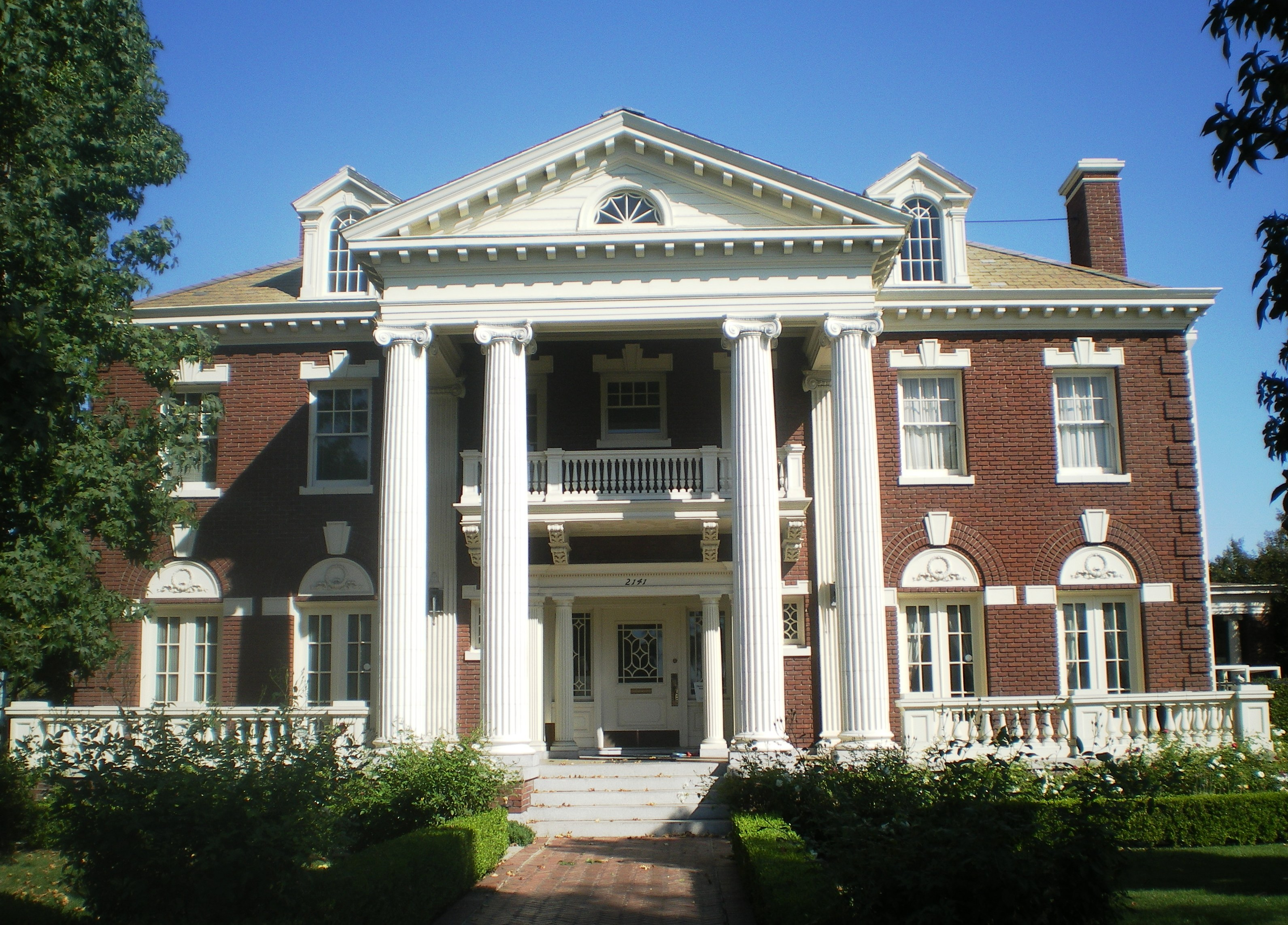 Eugene W. Britt House, 2141 W. Adams Blvd., West Adams, Los Angeles, CA (HCM #197)